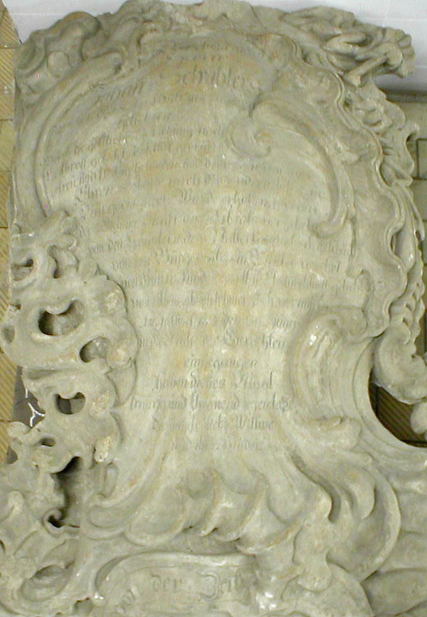 Grabmal des Heilbronner Bürgermeisters Johannes Schübler (* 18. April 1686 in Straßburg; † 24. Juni 1757 in Heilbronn)